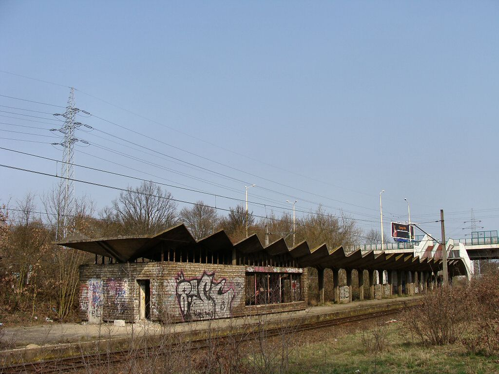 Nieczynny przystanek kolejowy Szczecin Pogodno.